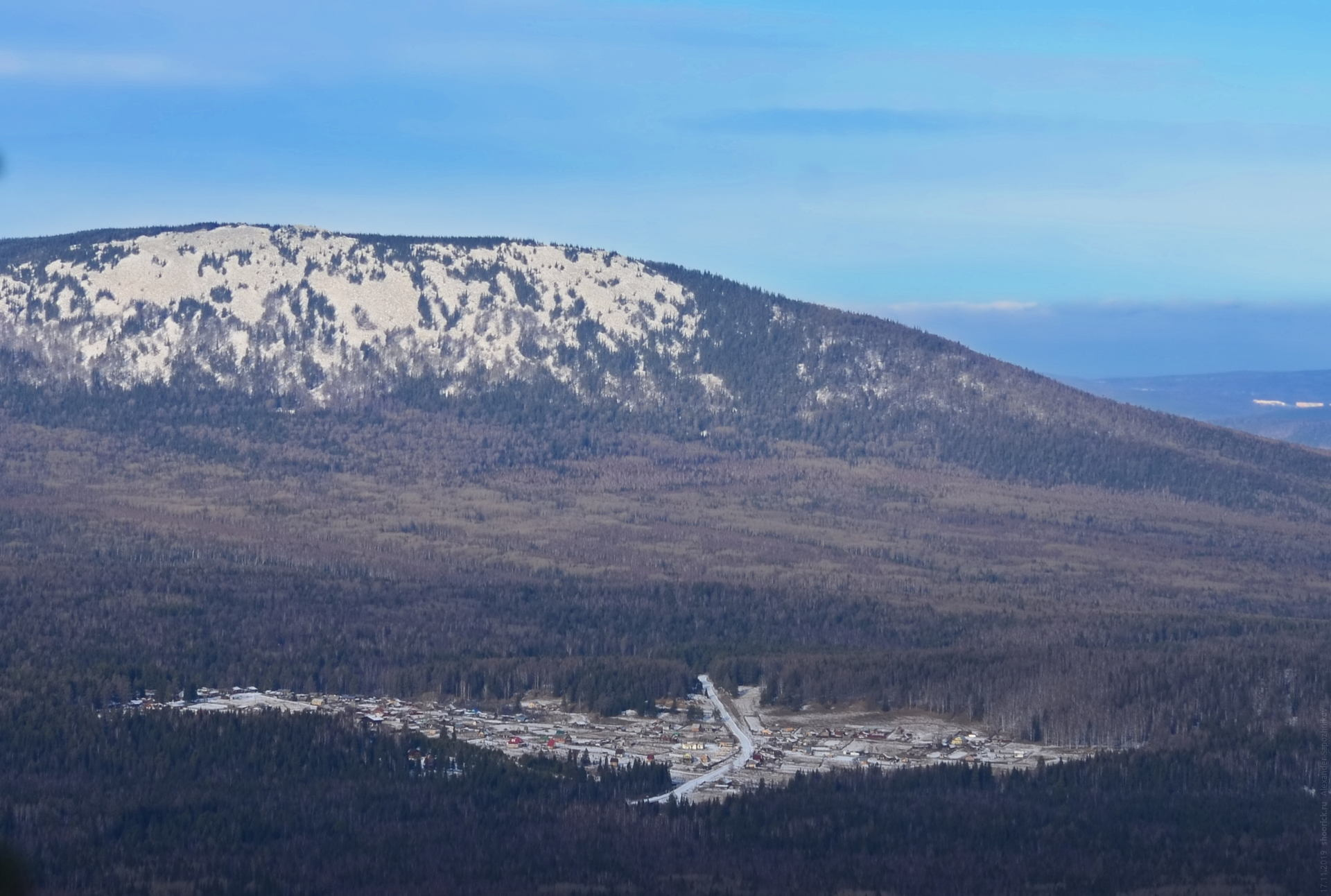 Южный Урал, национальный парк «Зюраткуль». Северо-восточный край хребта Большая Сука́ и посёлок Сибирка Саткинского района Челябинской области. Вид с Большой Калагазы, высшей точки хребта Москаль.